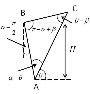 くさび土塊